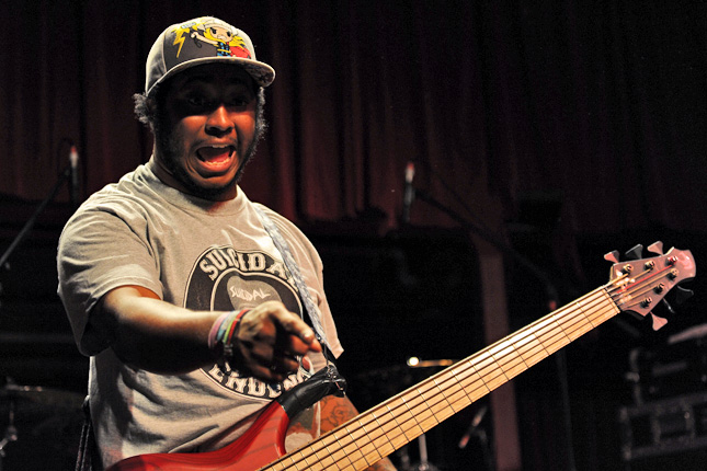 Suicidal Tendencies @ Capitol (18/5/2011)